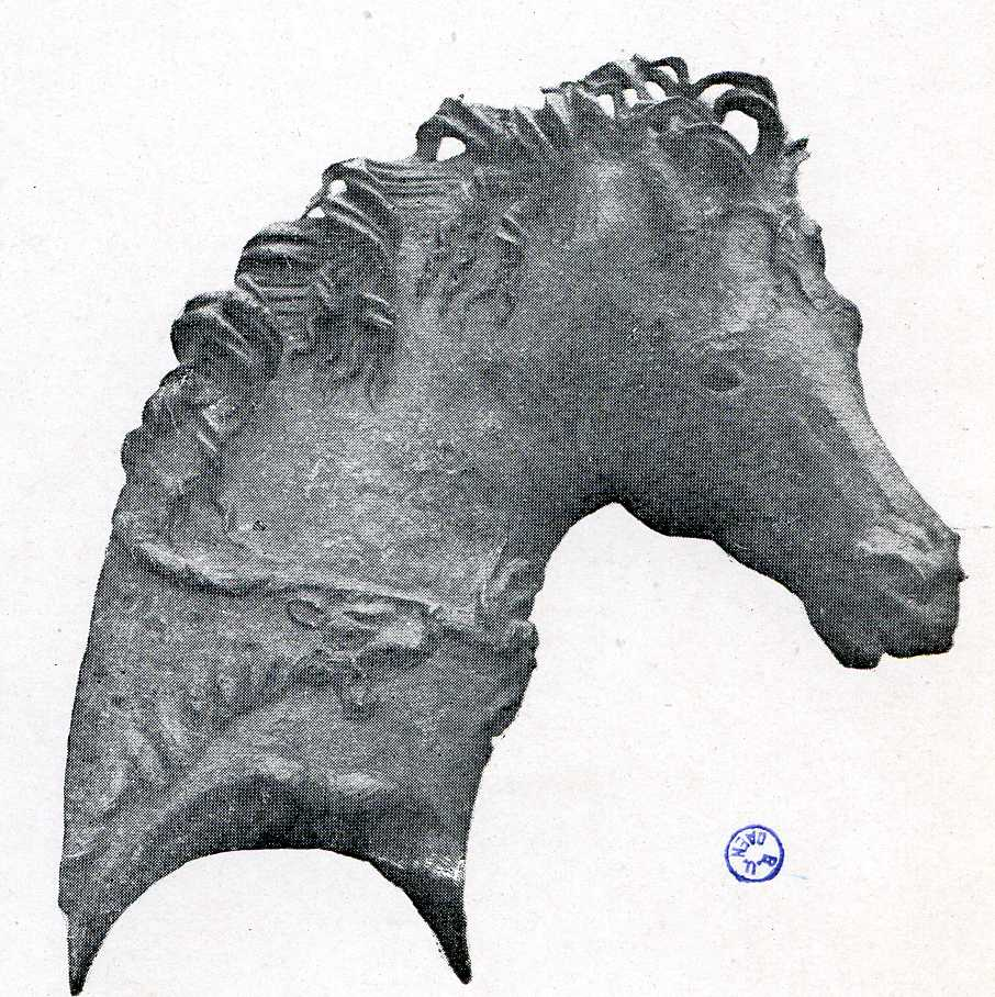 Protomé de cheval découvert dans les fouilles du navire de Mahdia